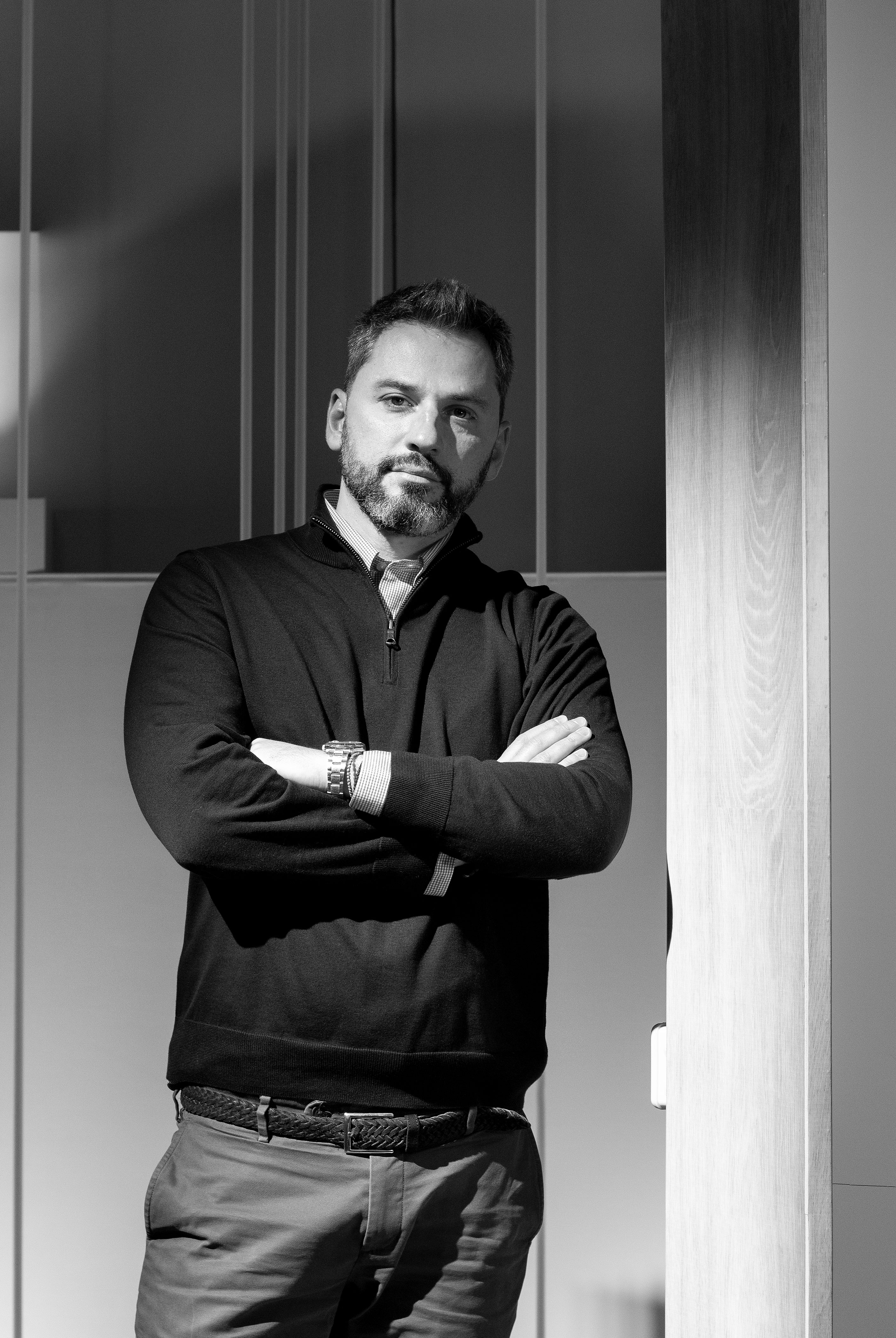 Автор фото: Кристина Нестеренко